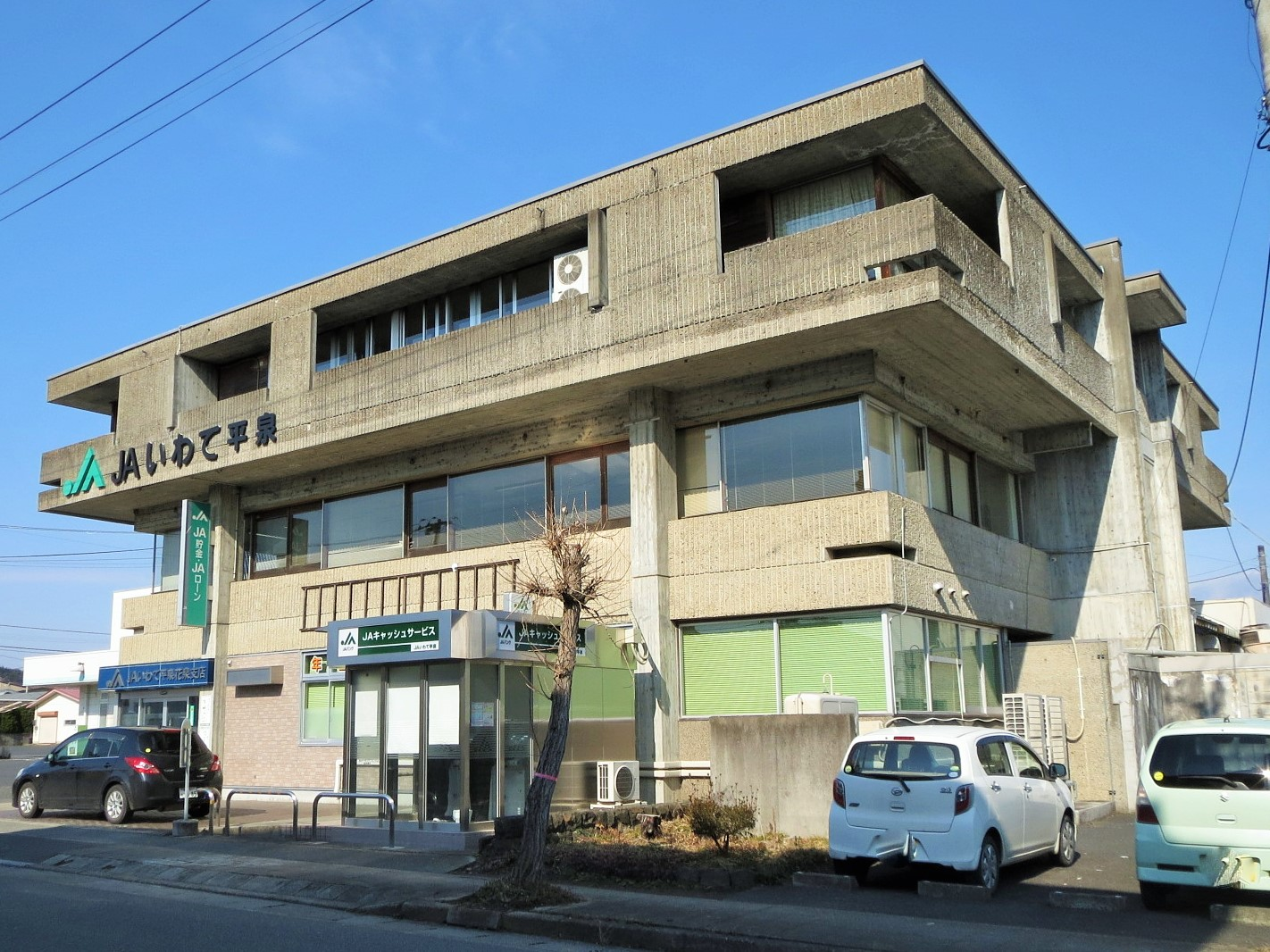 一関市にあるJA平泉花泉支店 Canon IXY 3